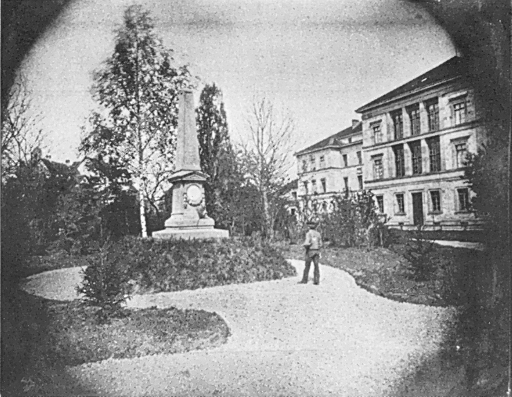 Tübingen. Das alte Silcher-Denkmal hinter Neuer Aula.